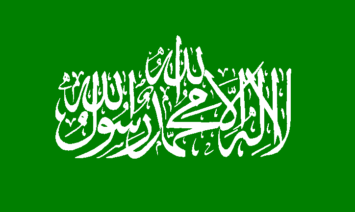 علم حماس